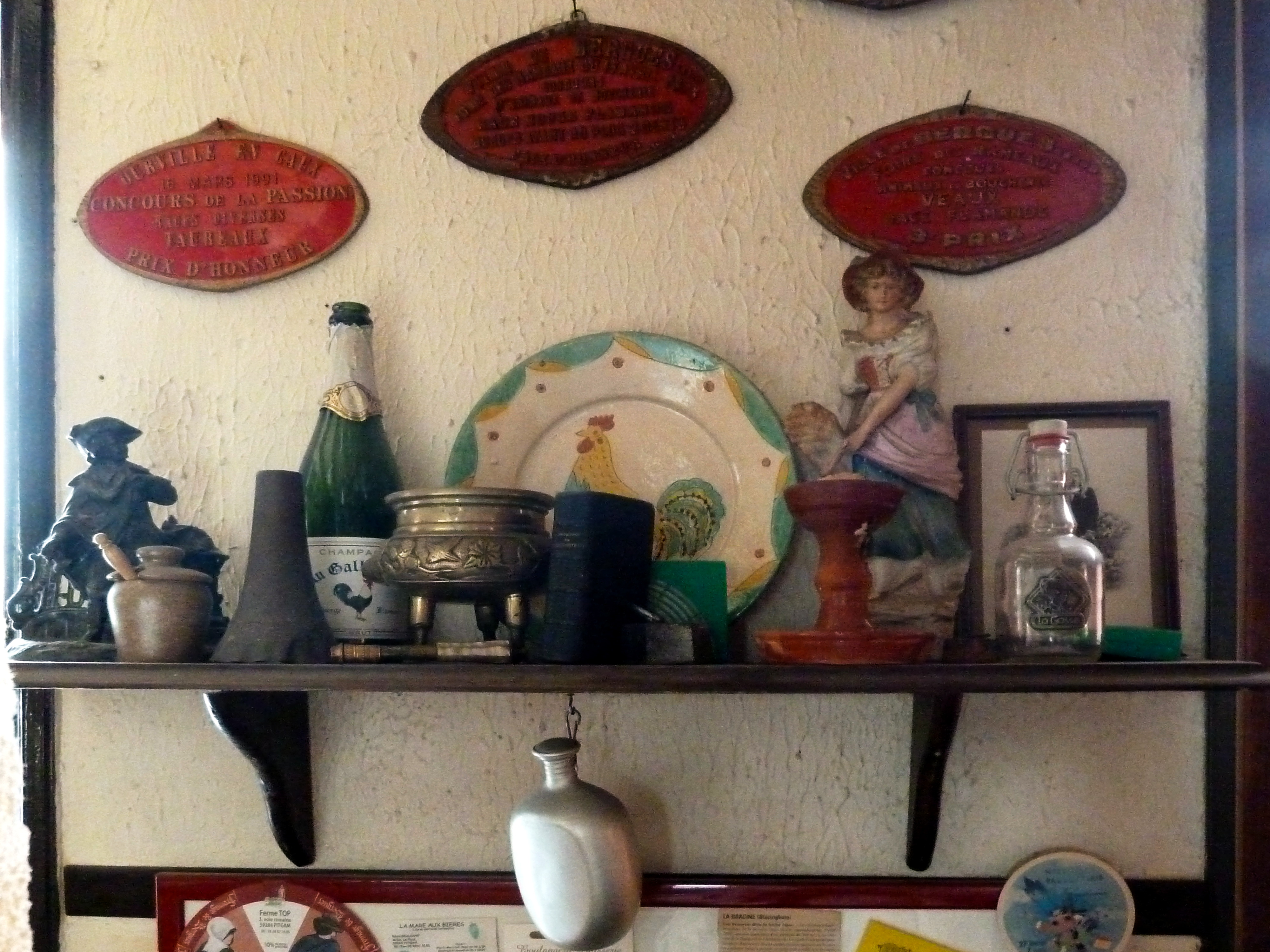 L'intérieur de l’estaminet du Gallodrome à Drincham Nord, France